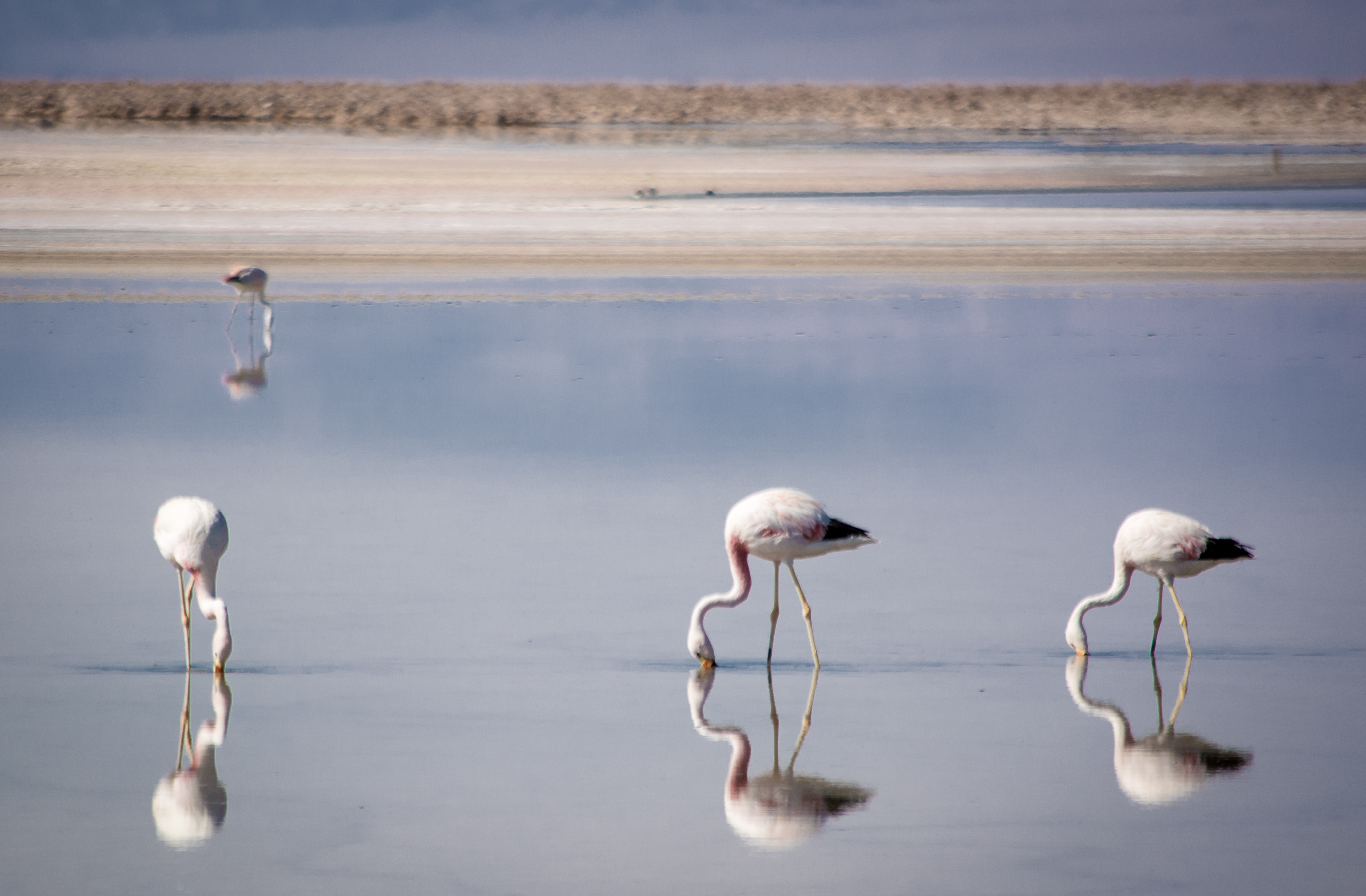 San Pedro de Atcama.